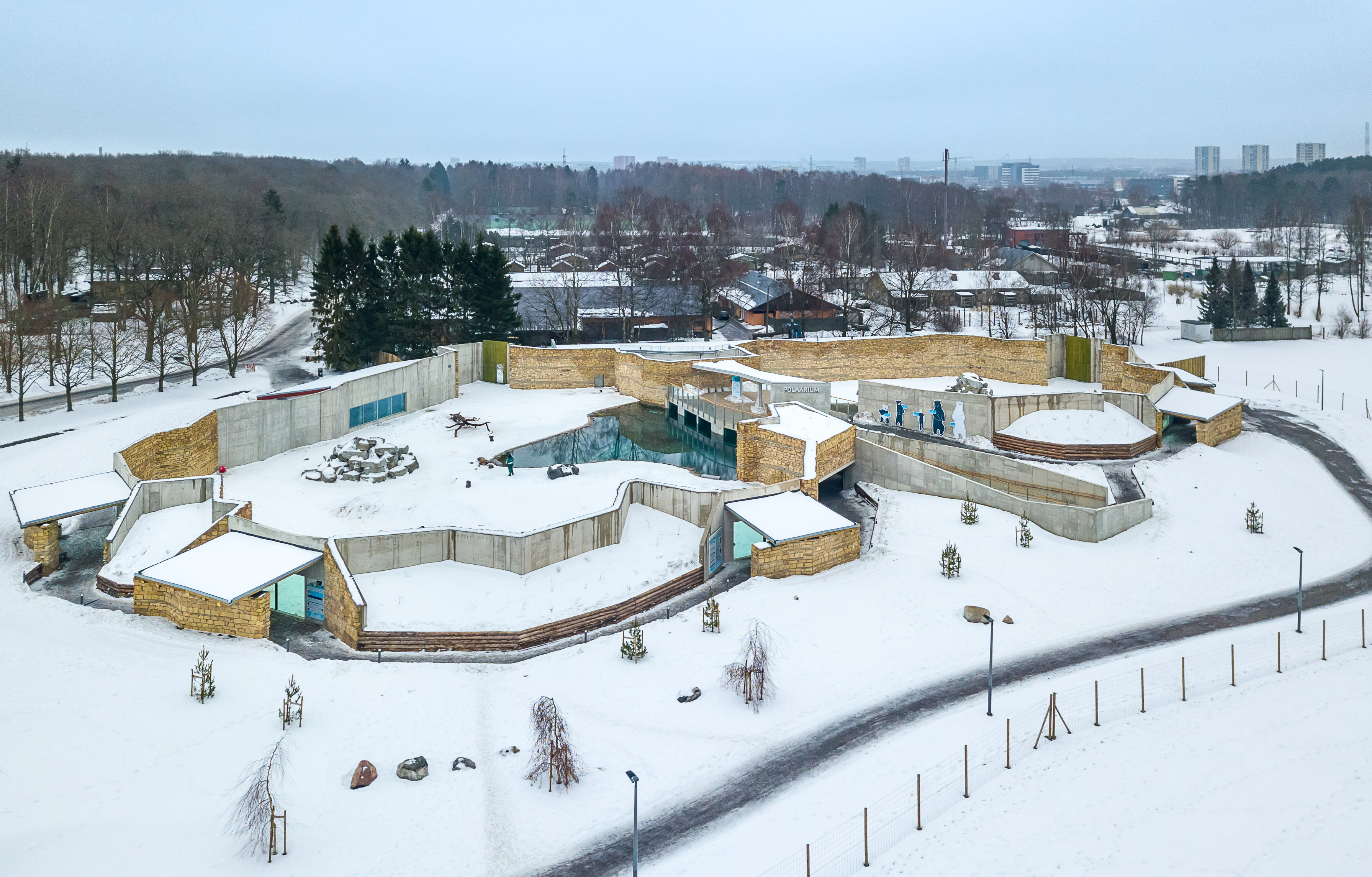 Jääkarumaailm